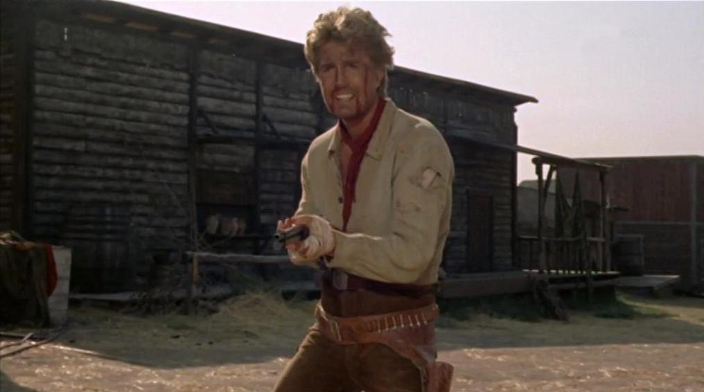 Scena del film Degueyo (1966)